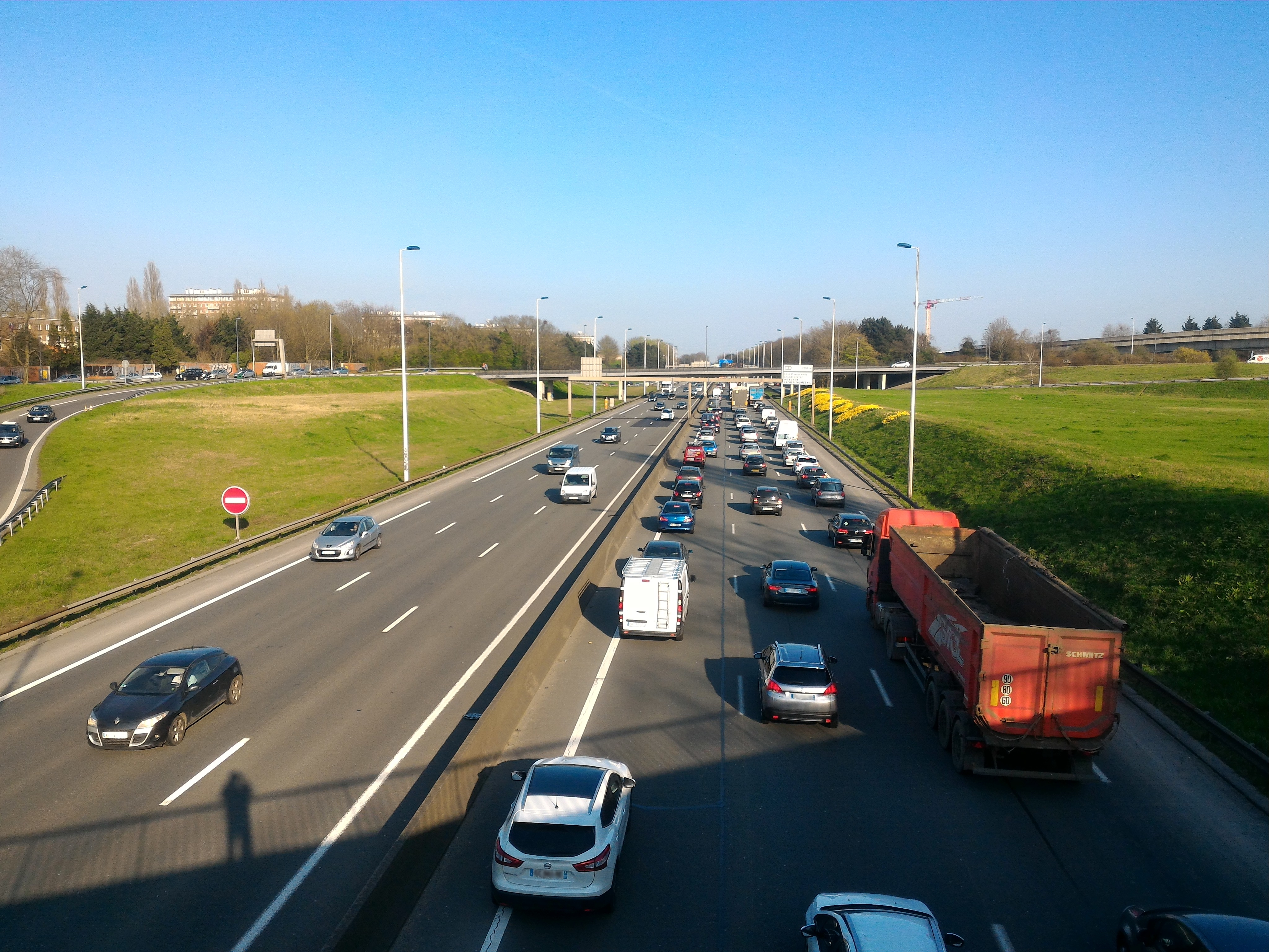 L'autoroute A25 au sud-ouest de Lille, au niveau de la sortie 4